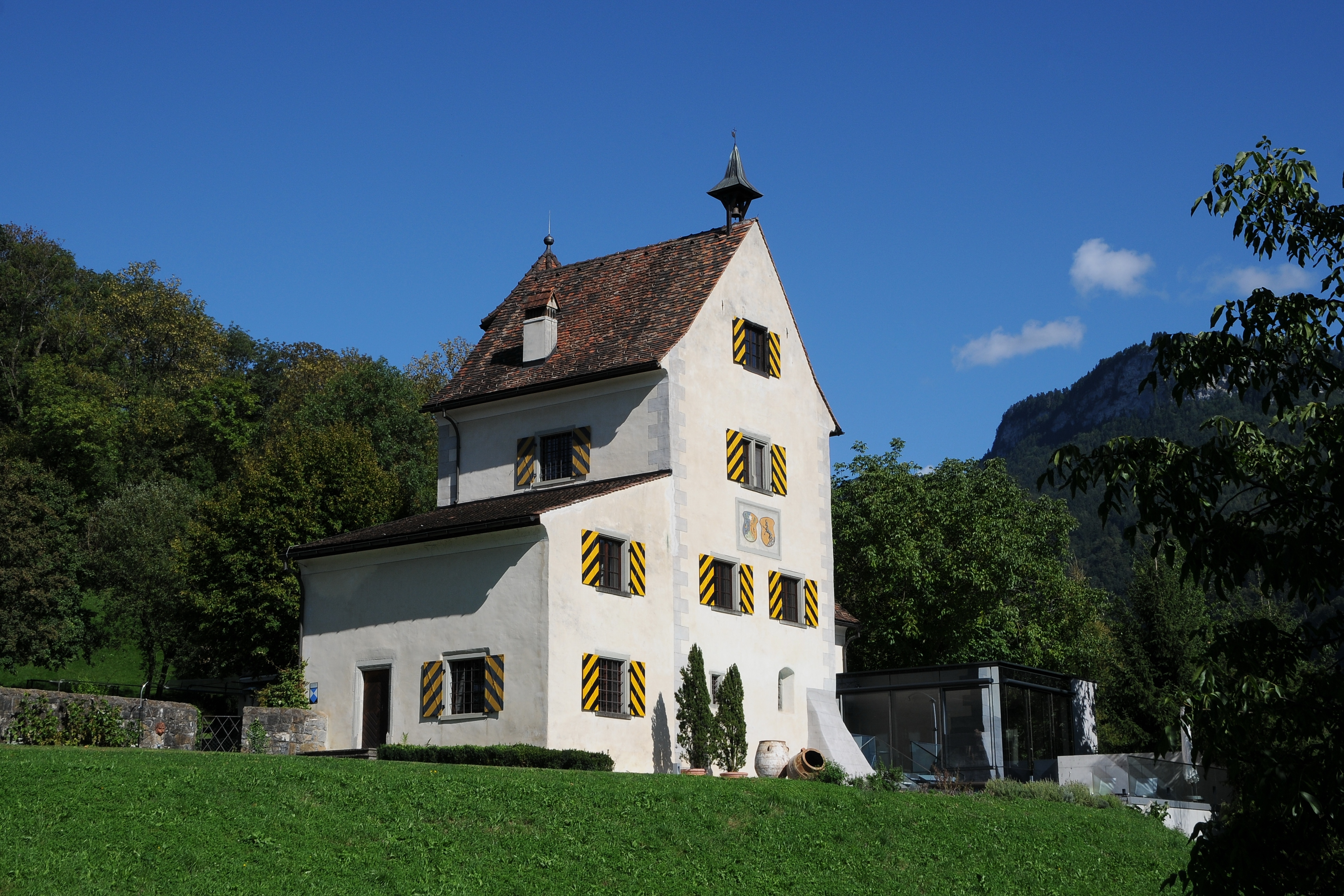 Ansitz Sonderberg (Zunderberg) in Götzis, Vorarlberg. Das Objekt steht unter Denkmalschutz. *** Veröffentlicht: Alois Niederstätter in "Geschichte Vorarlbergs Band 2 Vorarlberg 1523 bis 1861 Auf dem Weg zum Land ISBN 978-3-7030-0864-1 2015